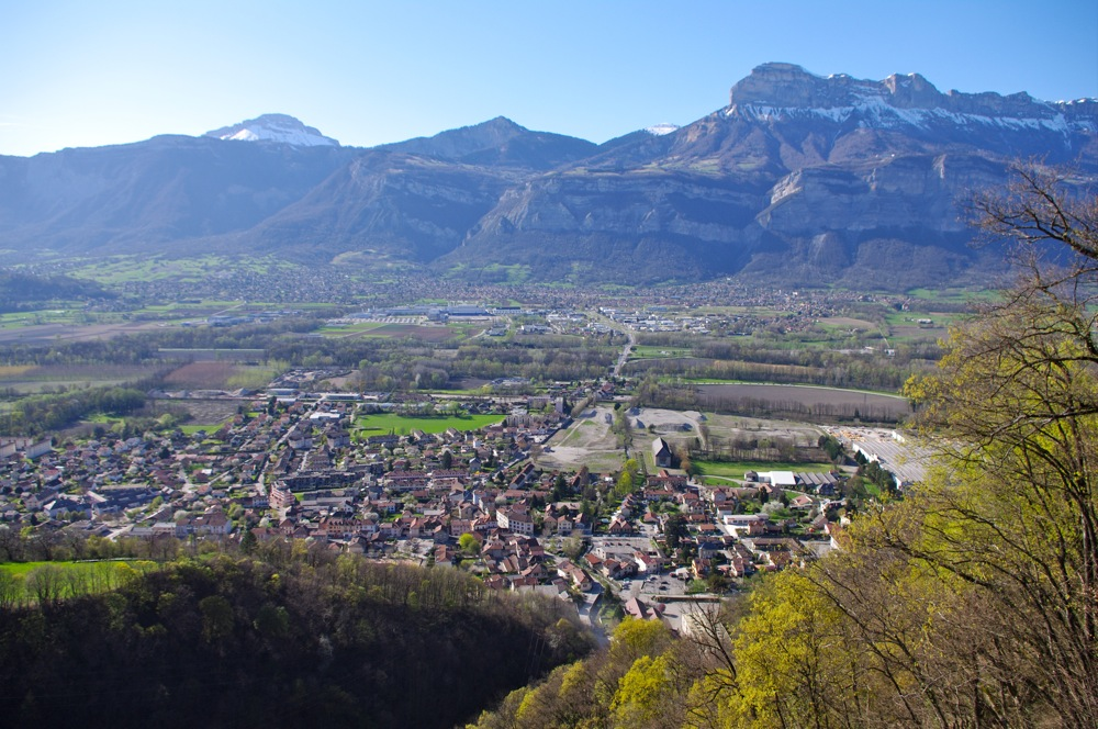 Brignoud, Villard-Bonnot, au fond la Chartreuse